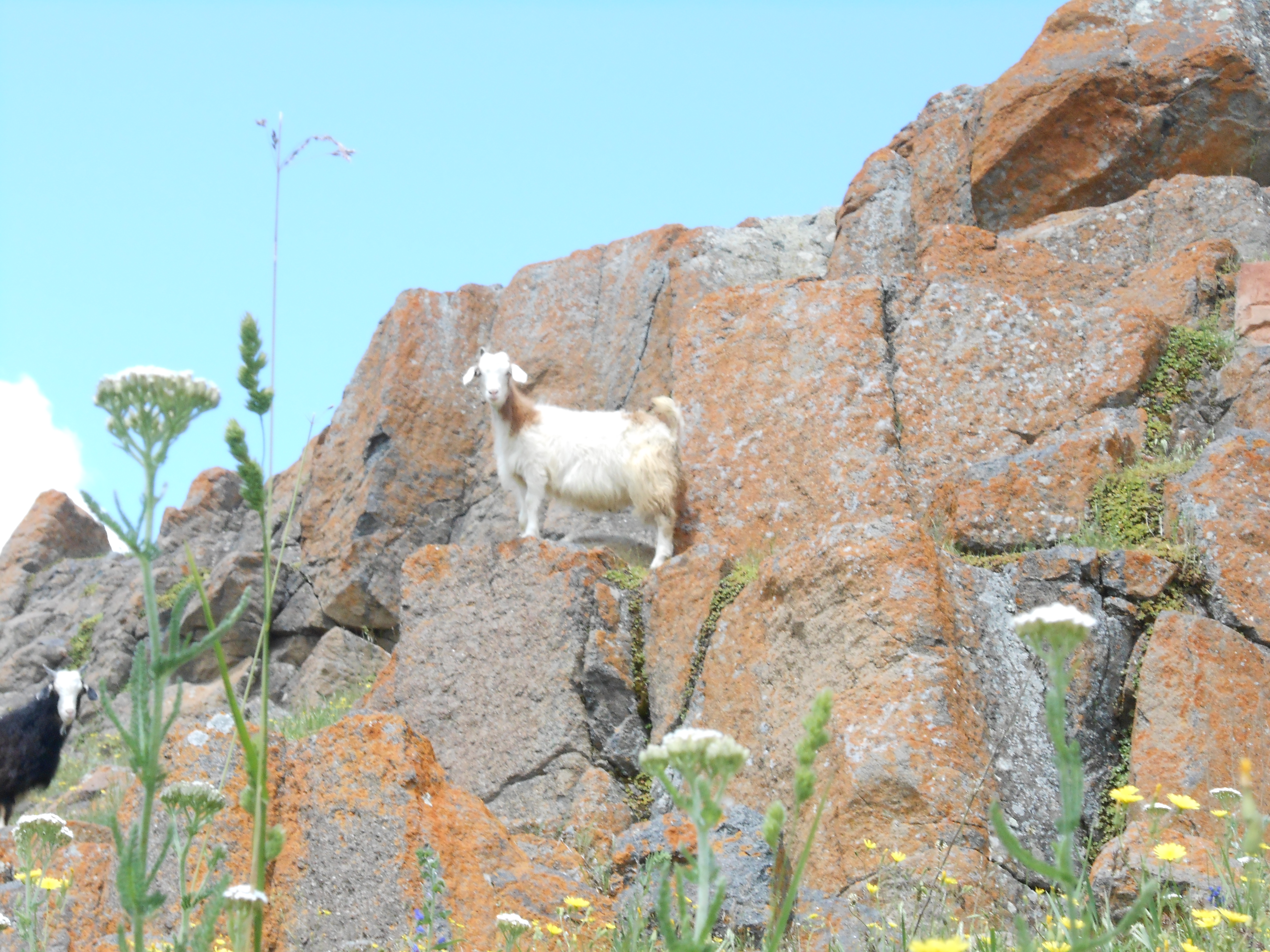 Հարթագյուղում